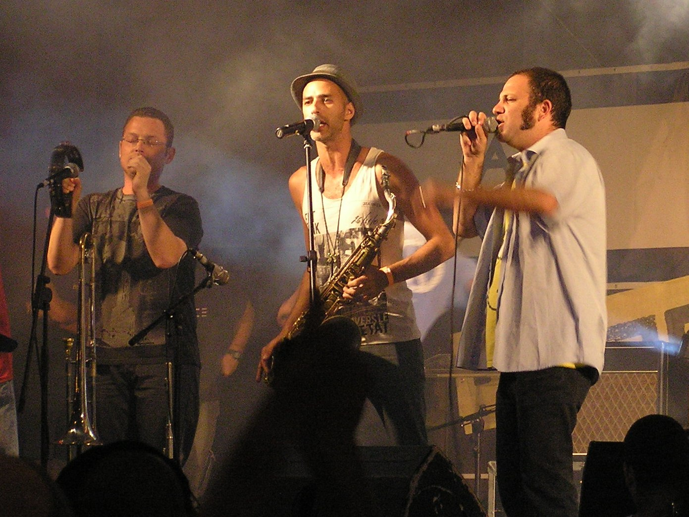 הדג נחש בעצרת "הנגד דורש צדק חברתי" בבאר שבע